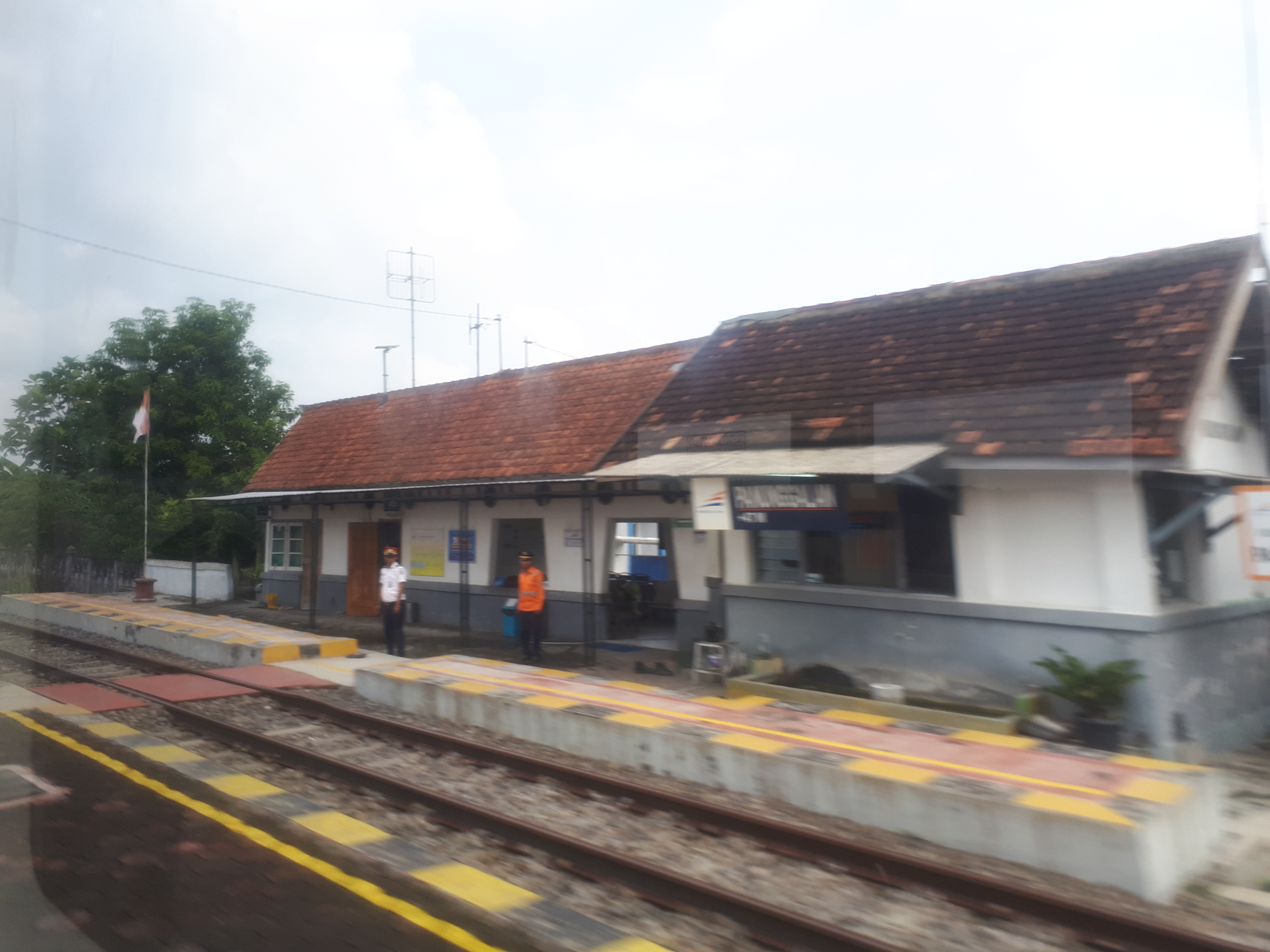 Stasiun Panunggalan tahun 2020